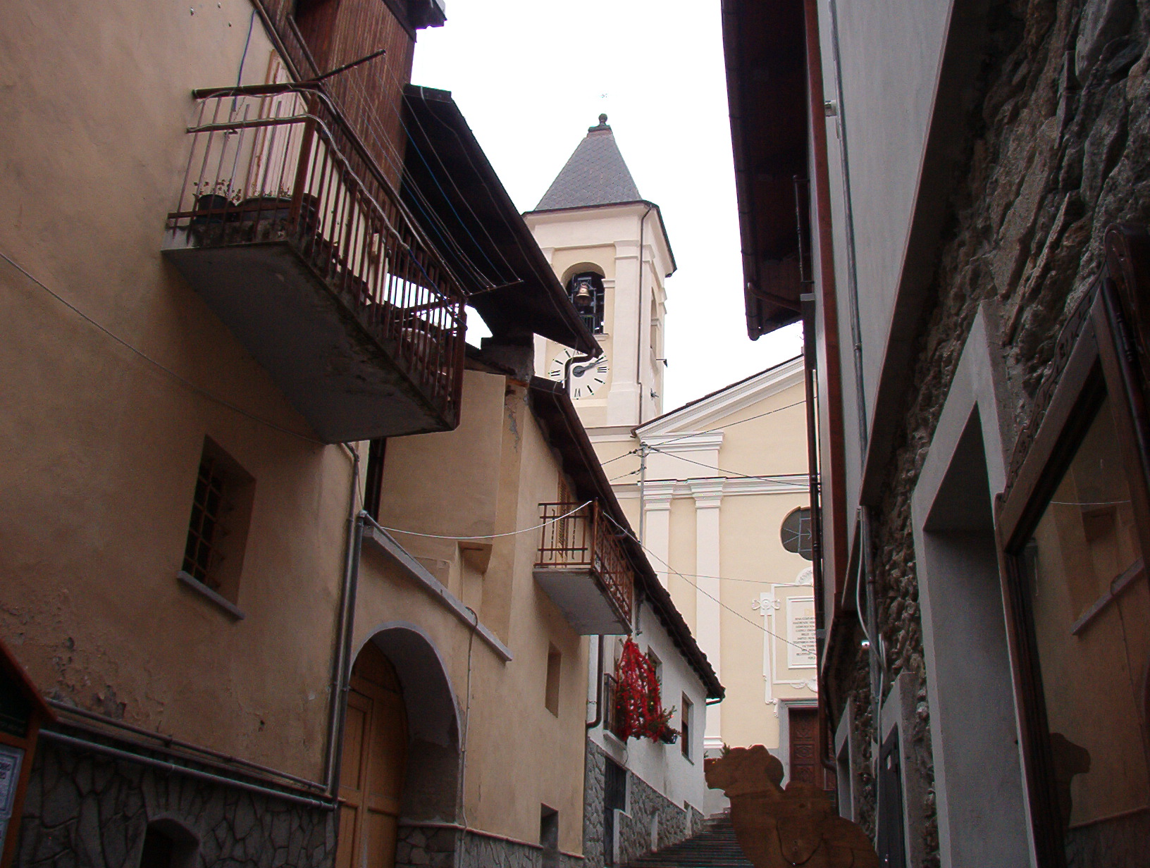 Chiesa Parrocchiale Fenestrelle - Piemonte - Italy